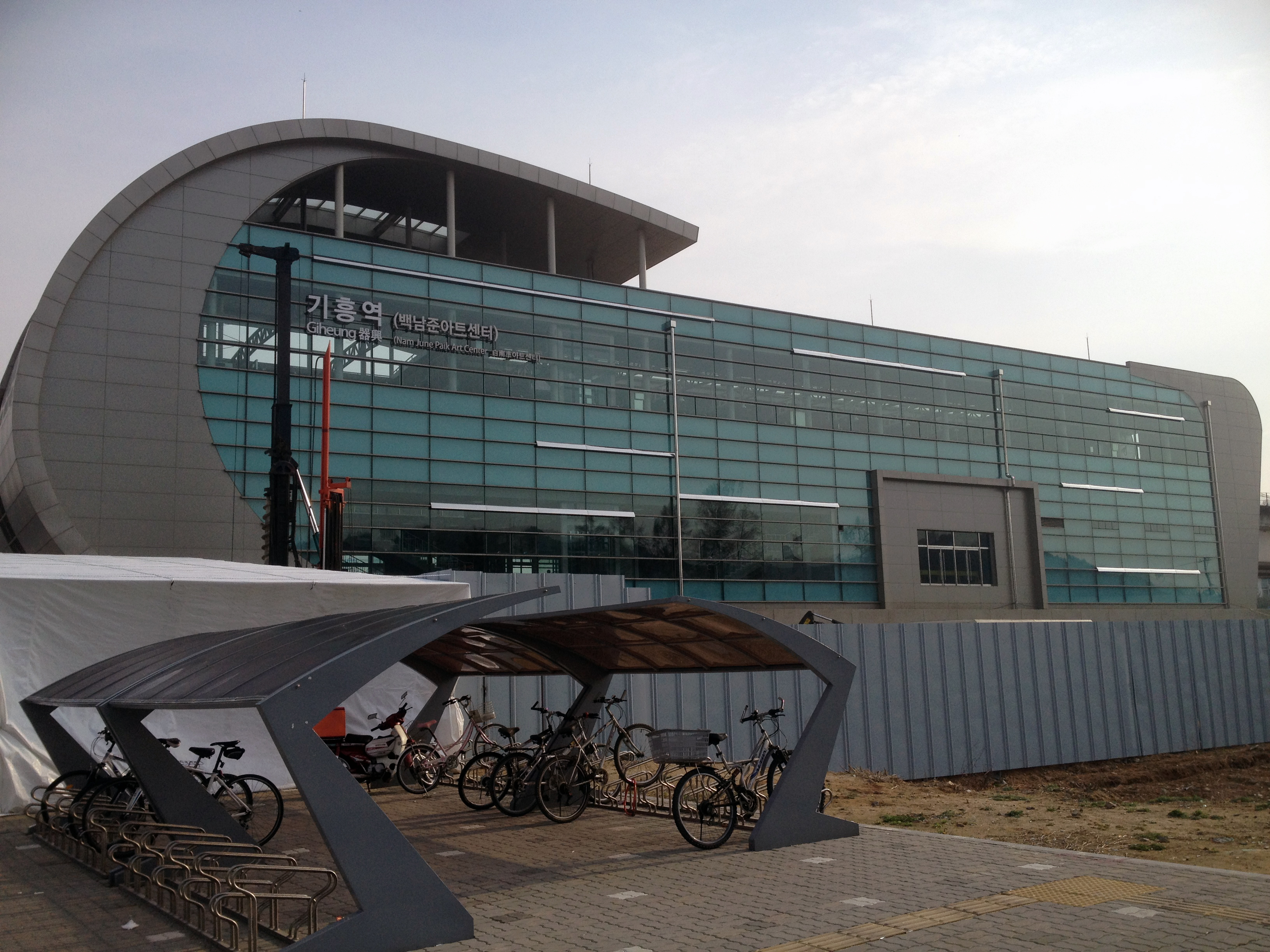 용인경전철 기흥역 역사